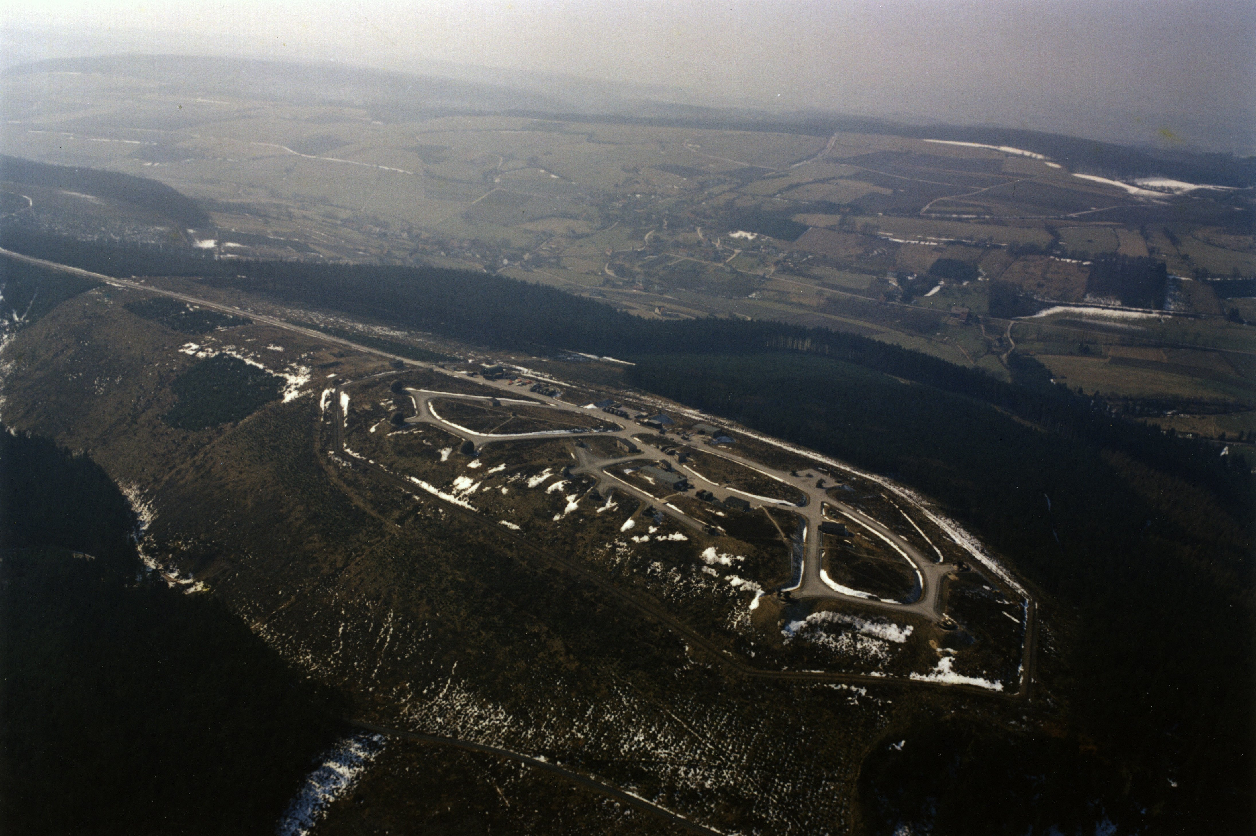 Luchtfoto van de Hawk Missile site in Velmerstot, Duitsland in 1973. De site was onderdeel van 329 squadron van 3GGW.